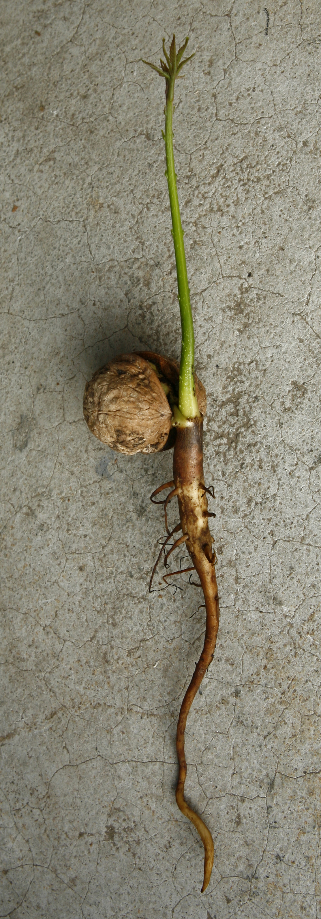 Spross / Keimling eines Walnussbaums